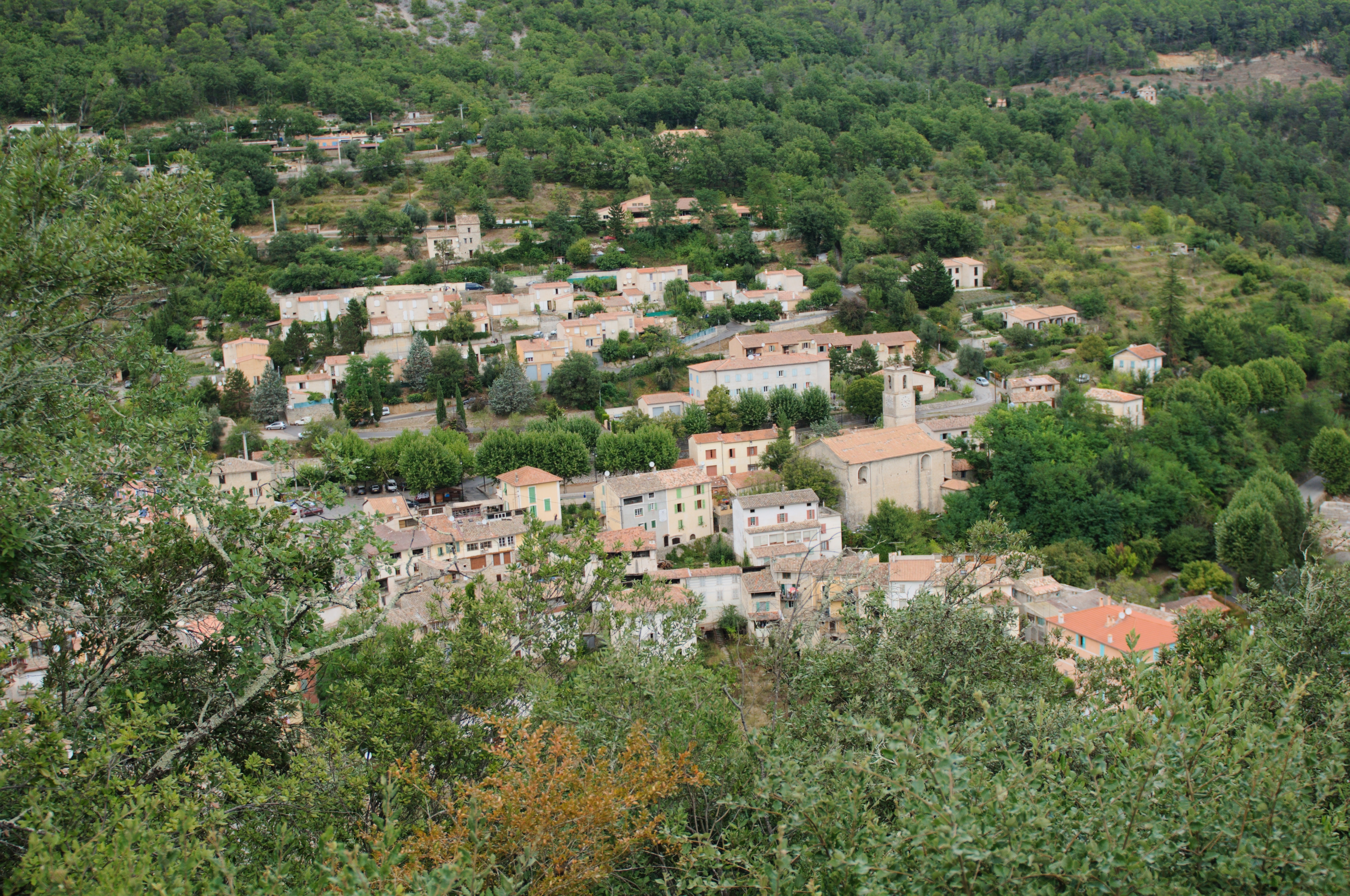 Photo de Roquesteron